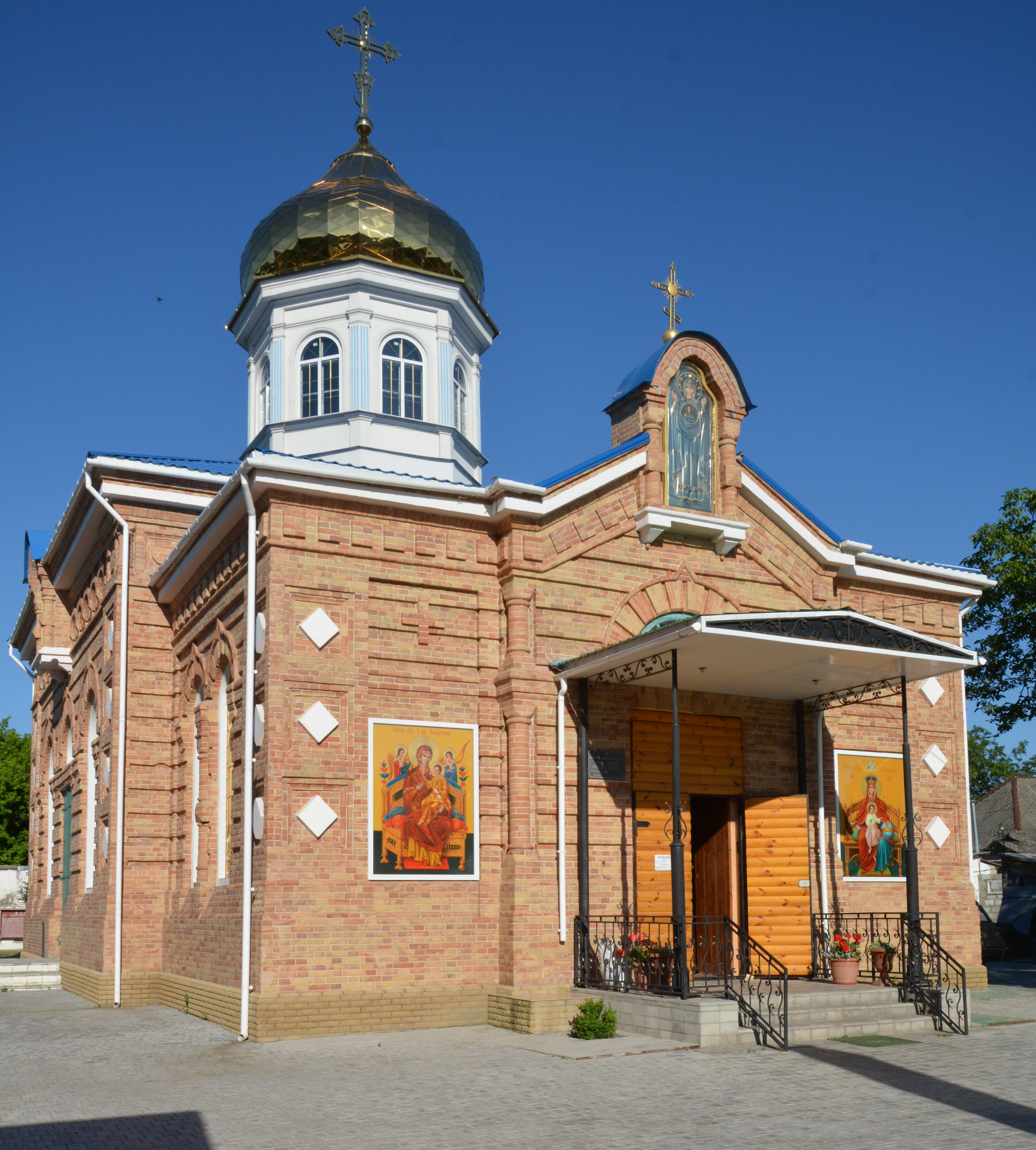 Старообрядова церква, Нікополь, вул. Шевченка, 6